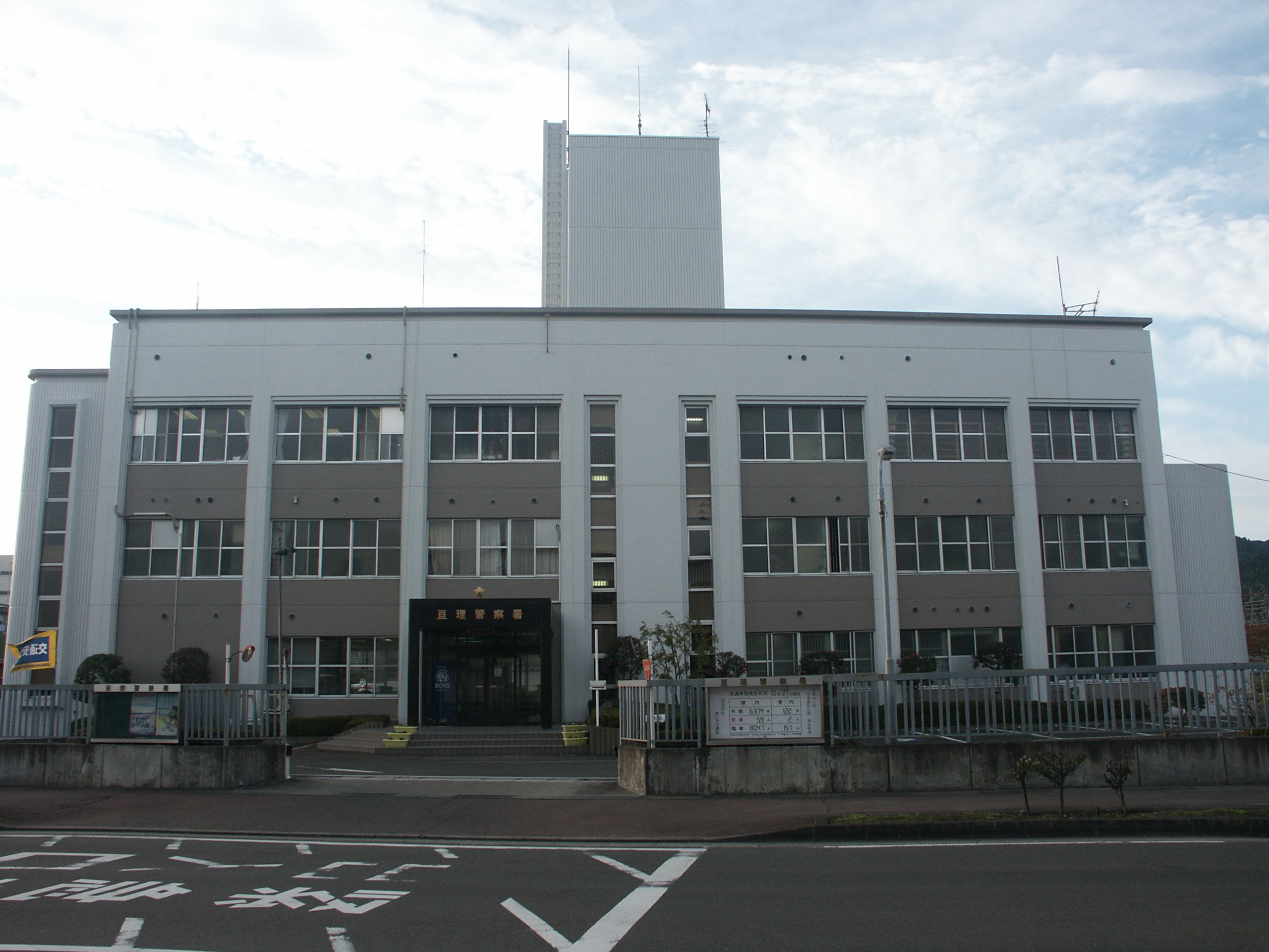 亘理警察署庁舎